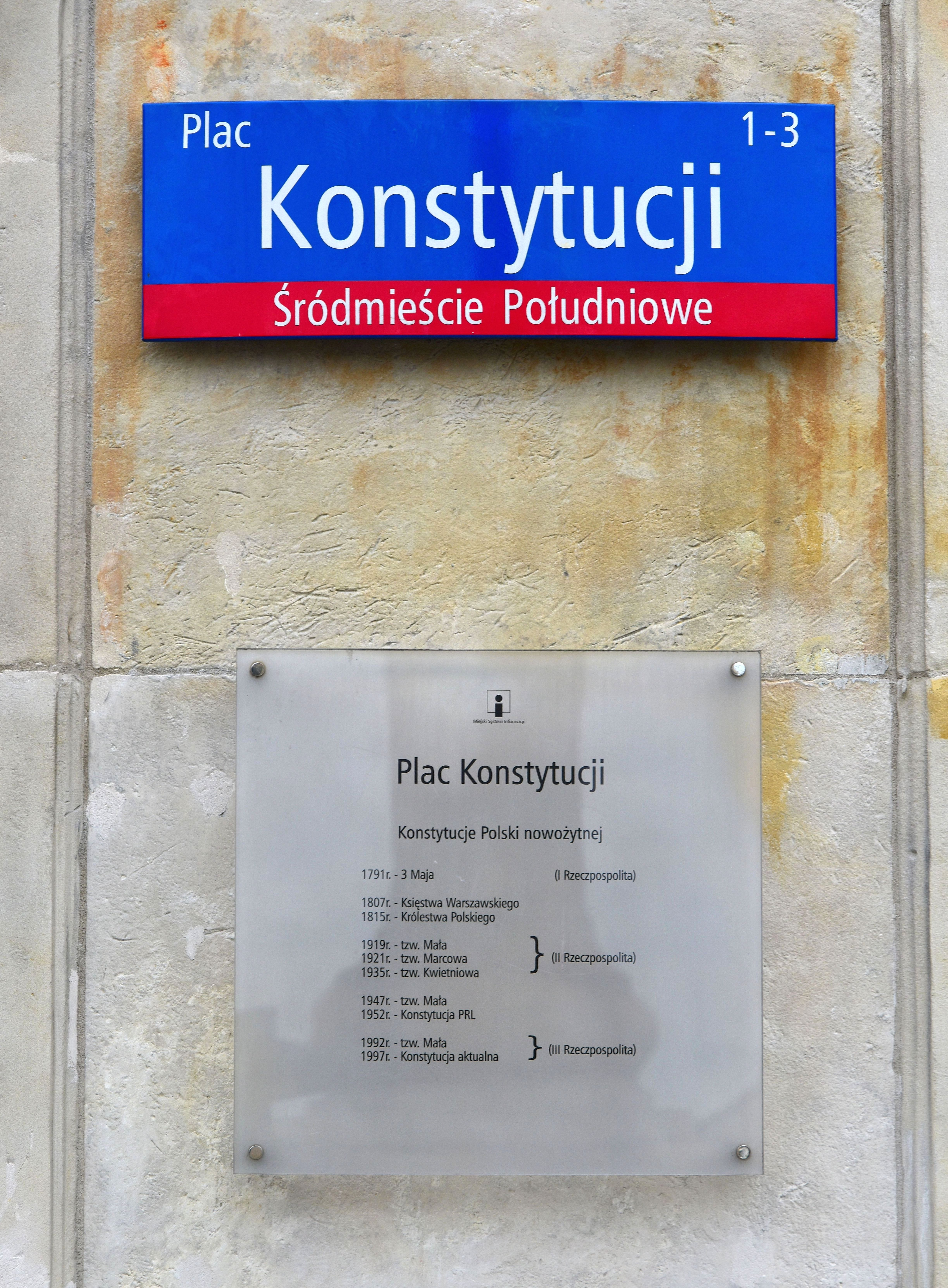 Tablice MSI na placu Konstytucji w Warszawie